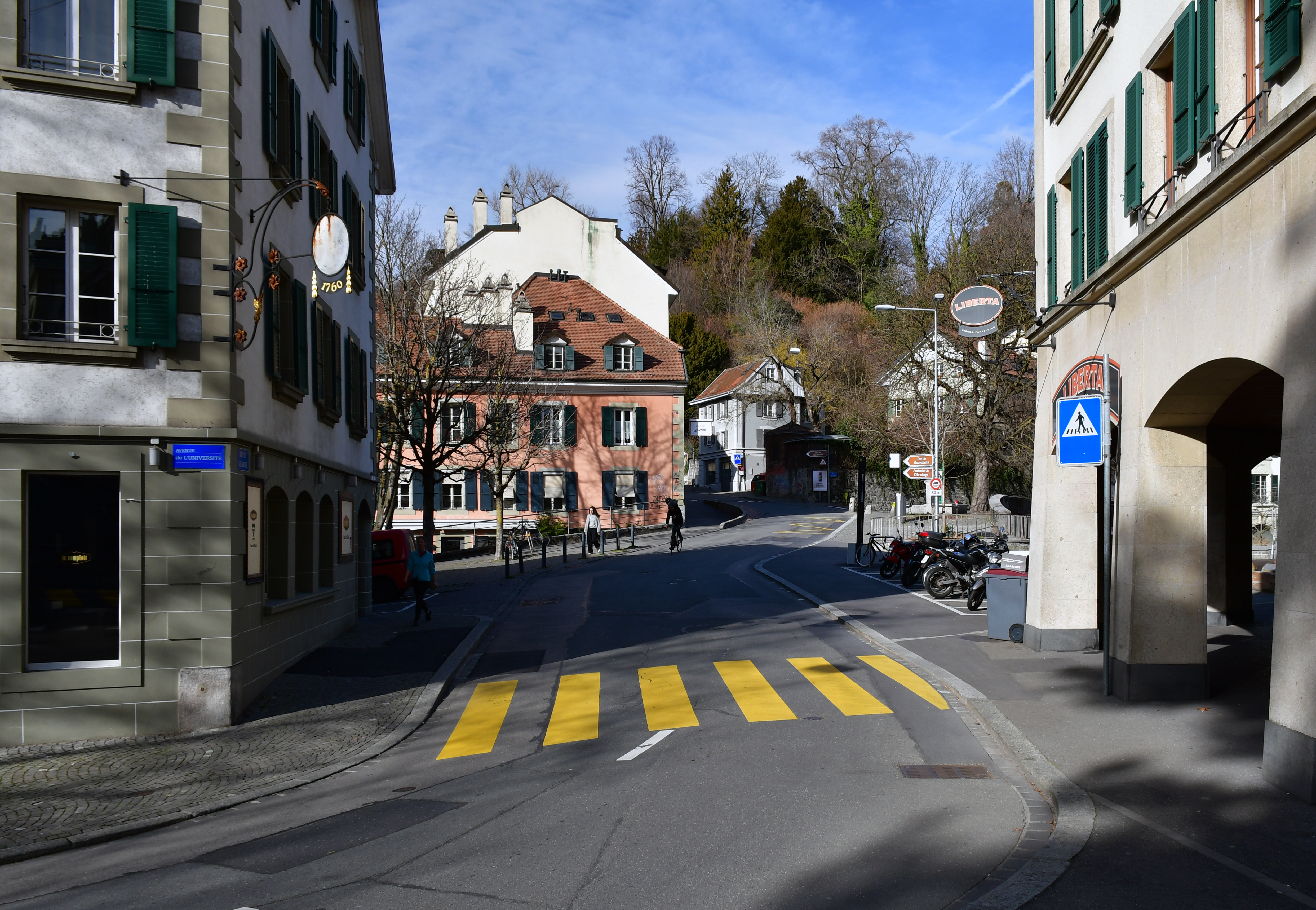 La rue de la Barre, Lausanne (Suisse), depuis le haut de l'avenue de l'Université. La rue de la Barre passe au-dessus du tunnel de la Barre.